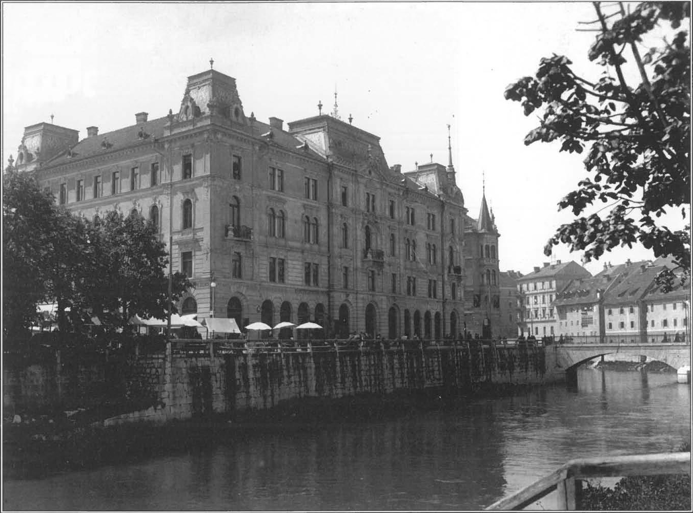 Kresija z nabrežjem Ljubljanice in delom Pogačarjevega trga